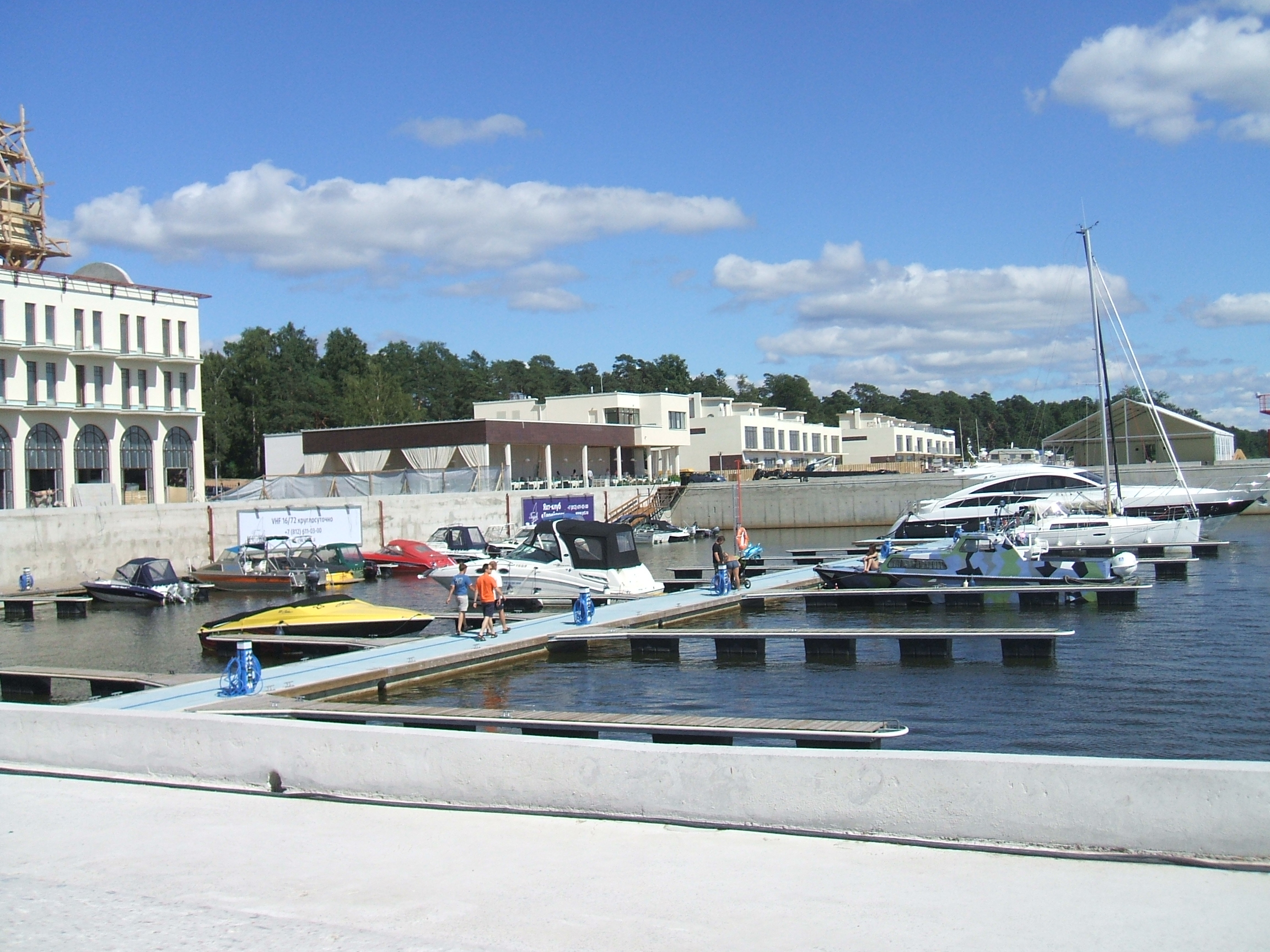 новая гавань яхтклуба в Зеленогорске Санкт-Петербурга